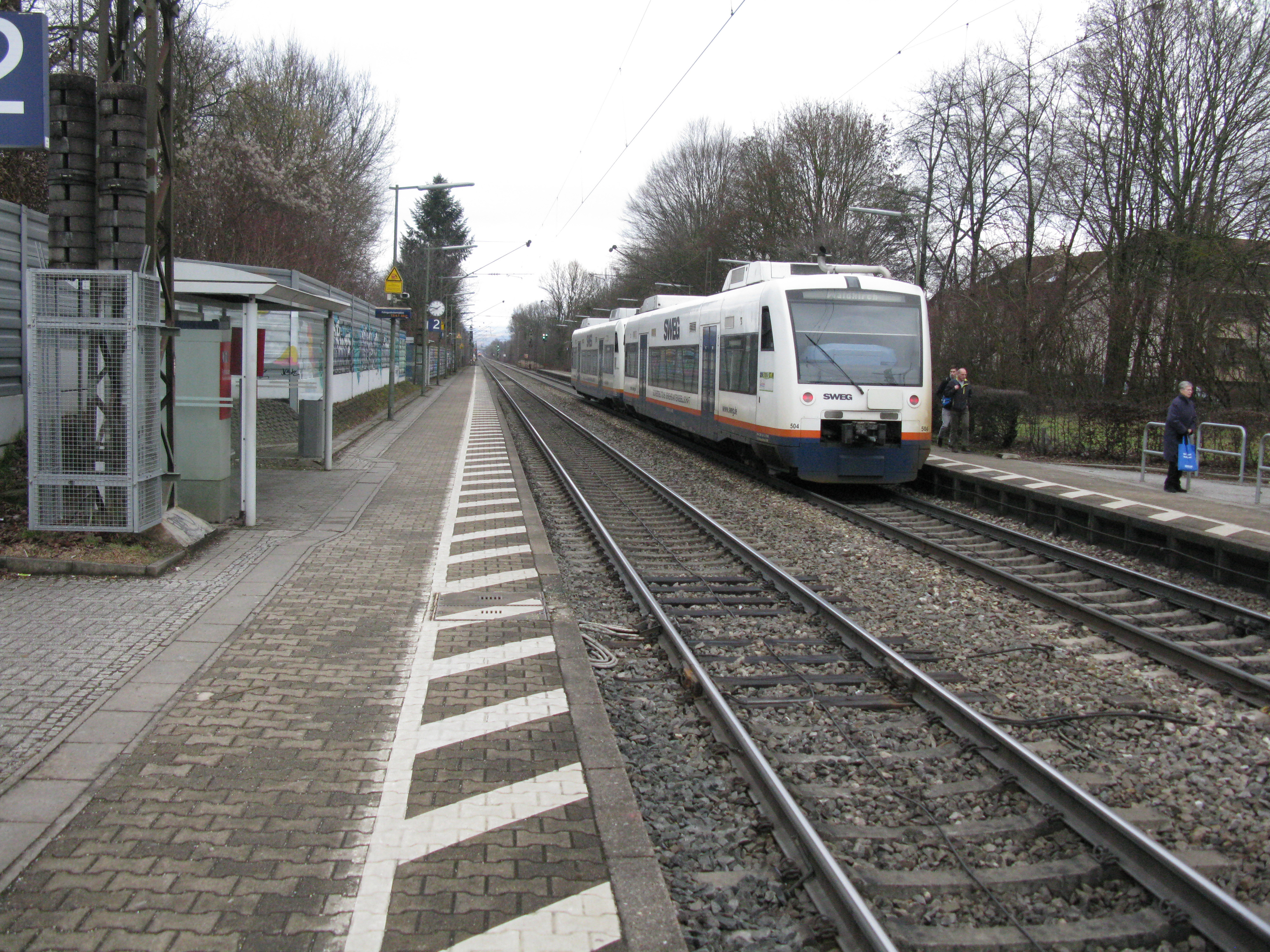 RegioShuttle der Breisgau-S-Bahn (VT 012 + VT 018) im Bahnhof Gundelfingen